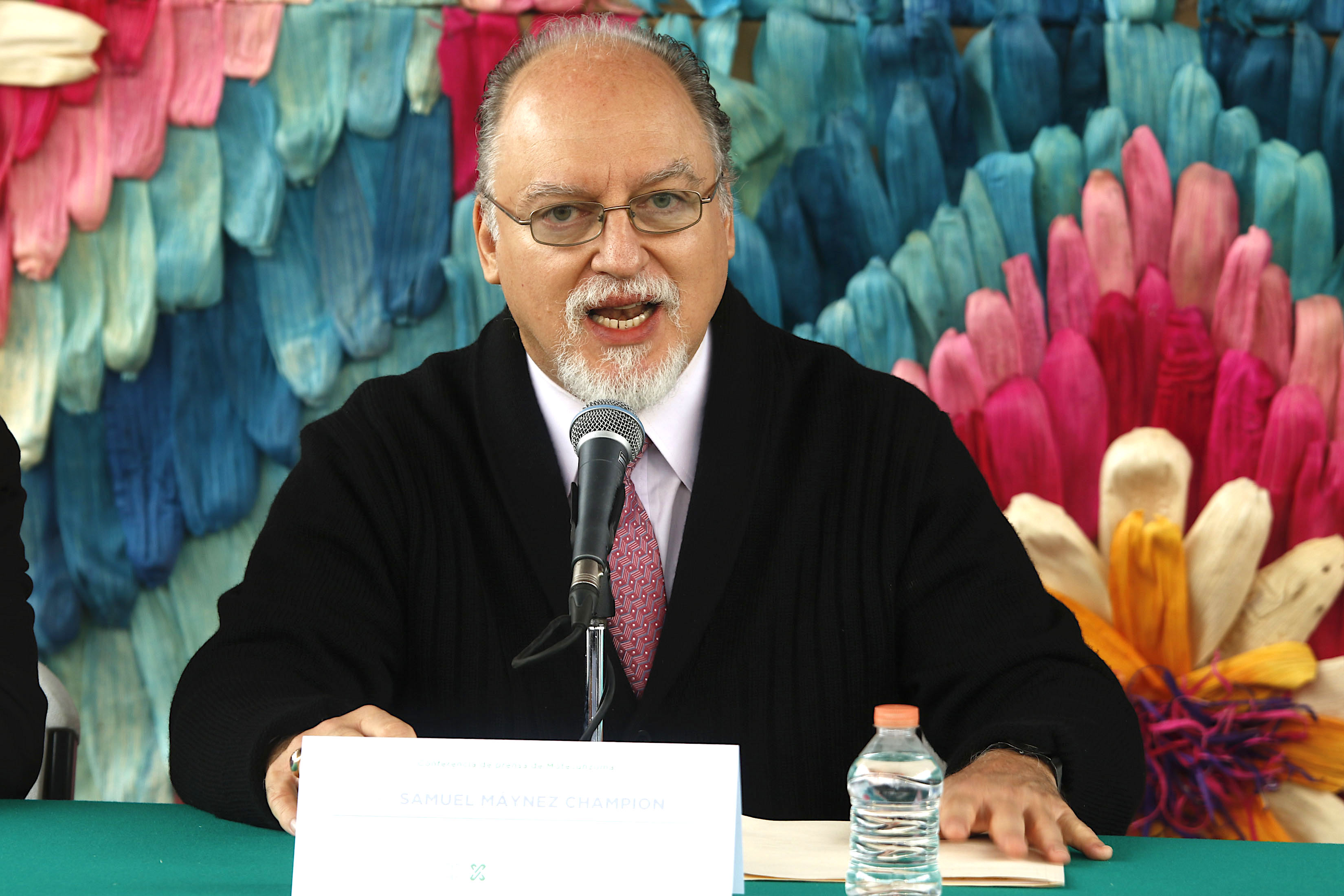 Lunes 30 de septiembre de 2019. En la plancha del Zócalo de la Ciudad de México, José Alfonso Suárez del Real y Aguilera, secretario de Cultura de la Ciudad de México, acompañado de Samuel Máynes Champion, músico y compositor de ópera; Roberto Valdovinos Alba, titular del Instituto de los Mexicanos en el Exterior; José Luis Cruz, director de escena y Edmundo Font López, poeta y pintor; presentaron en conferencia de prensa, los detalles de la presentación en México de la ópera Motecuhzoma II, del propio Máynez, a partir de la música de Vivaldi. Fotografía: Milton Martínez / Secretaría de Cultura de la Ciudad de México.